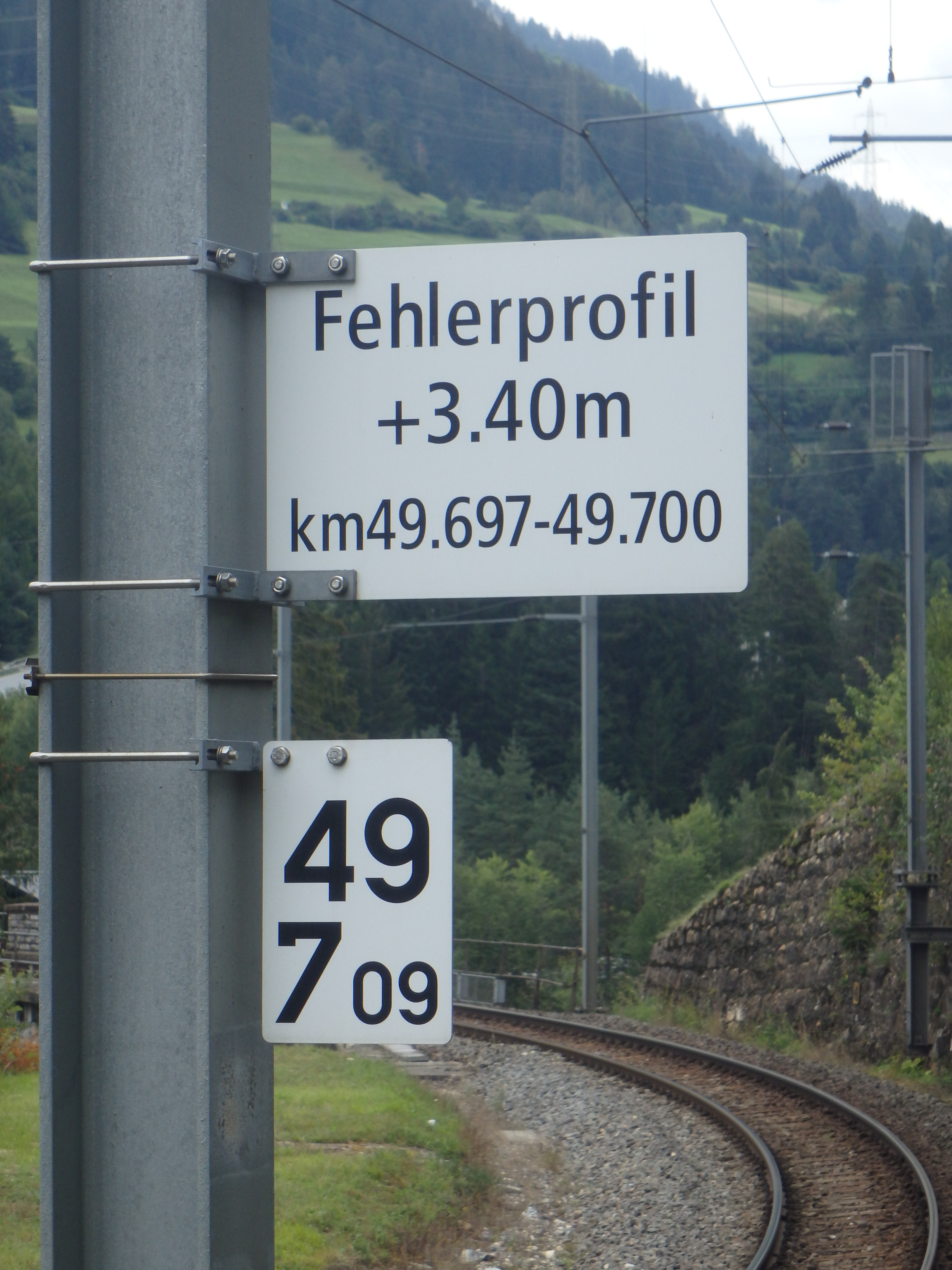 Fehlerprofiltafel zwischen Solis und Soliser Viadukt an der Albulalinie der Rhätischen Bahn (RhB), darunter eine Metertafel gemäss den Schweizerischen Fahrdienstvorschriften (FDV). Die obere Zahl der Metertafel gibt den Kilometer, die untere den Meter an.Literatur: Bundesamt für Verkehr: Fahrdienstvorschriften. Bern, 2012. R 300.2, Abschnitt 2.6.5